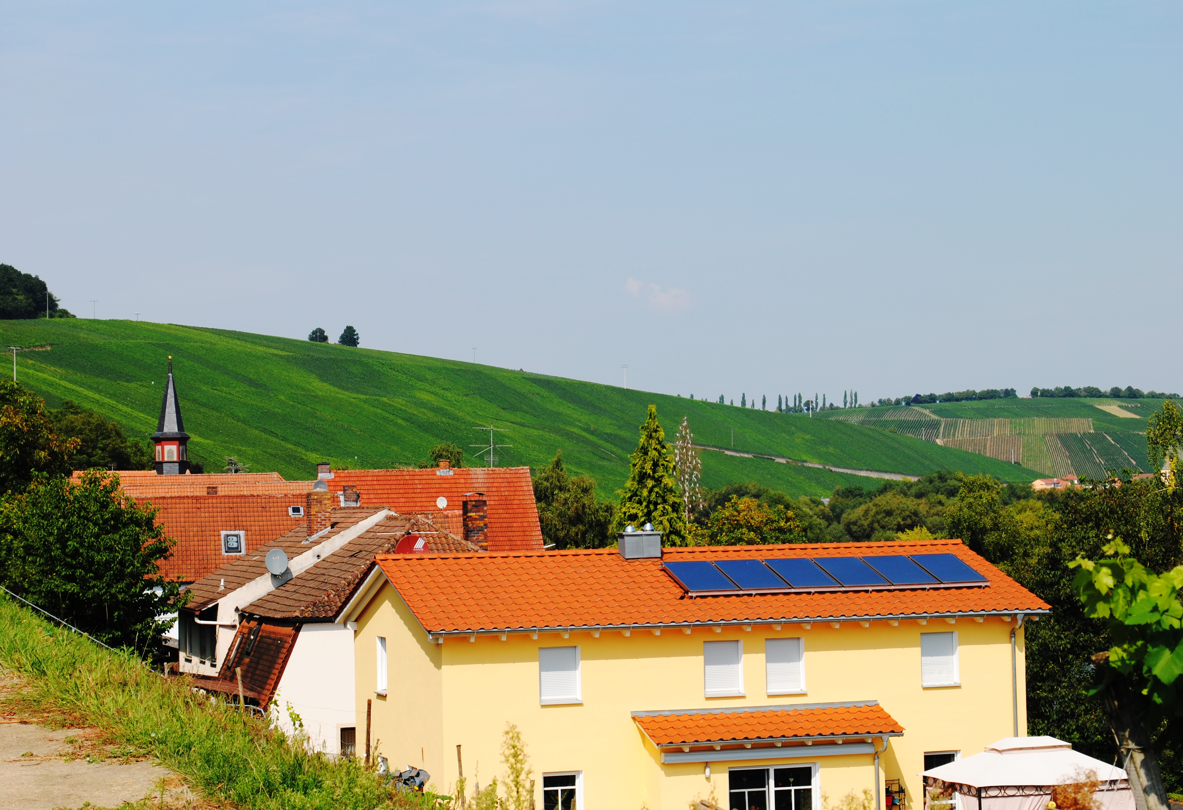 Köhler, Panorama